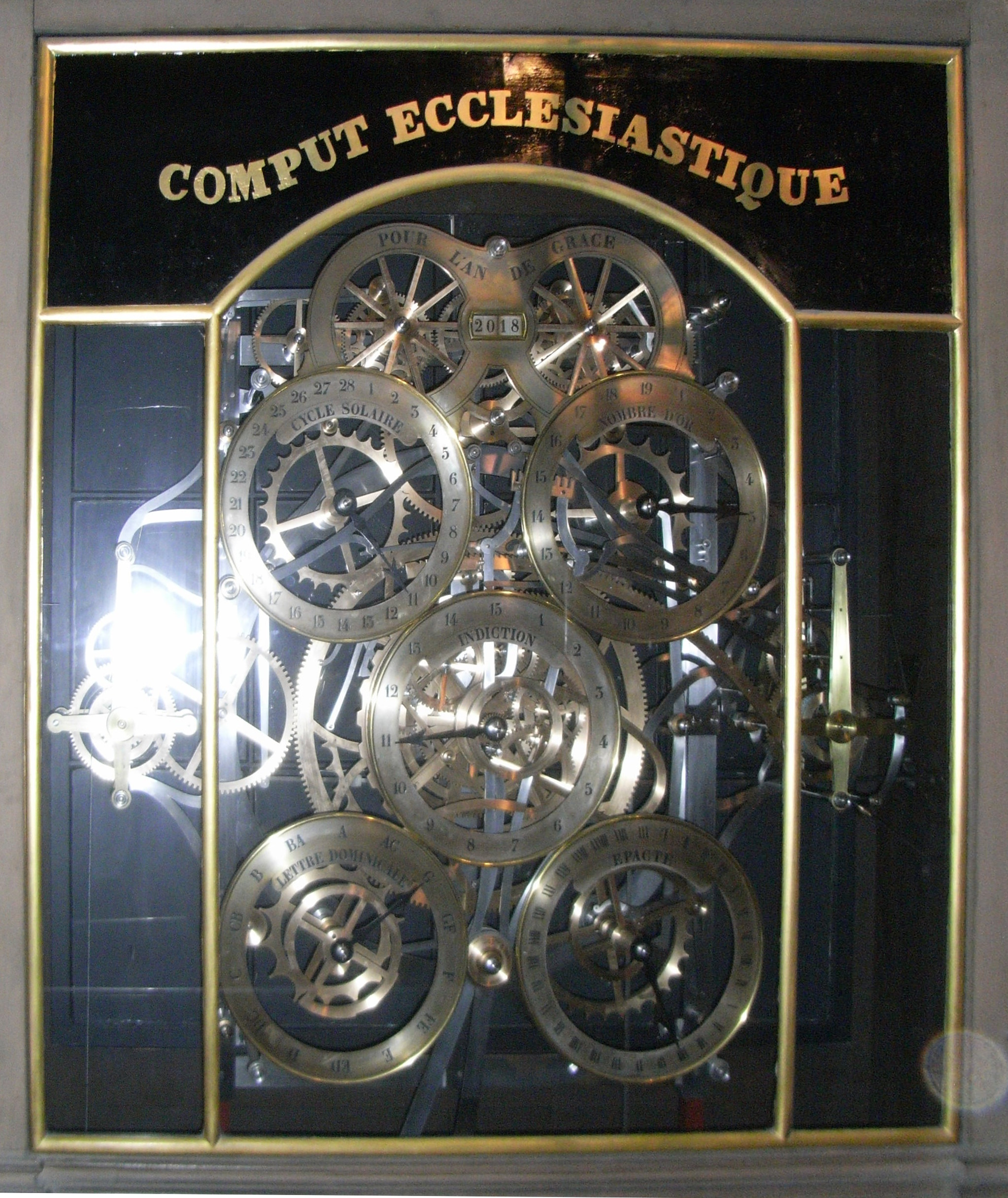 Horloge astronomique de Strasbourg, dans la cathédrale Notre-Dame (France) "Inscriptions sur roues : POUR L'AN DE GRACE CYCLE SOLAIRE NOMBRE D'OR INDICTION LETTRE DOMINICALE EPACTE "